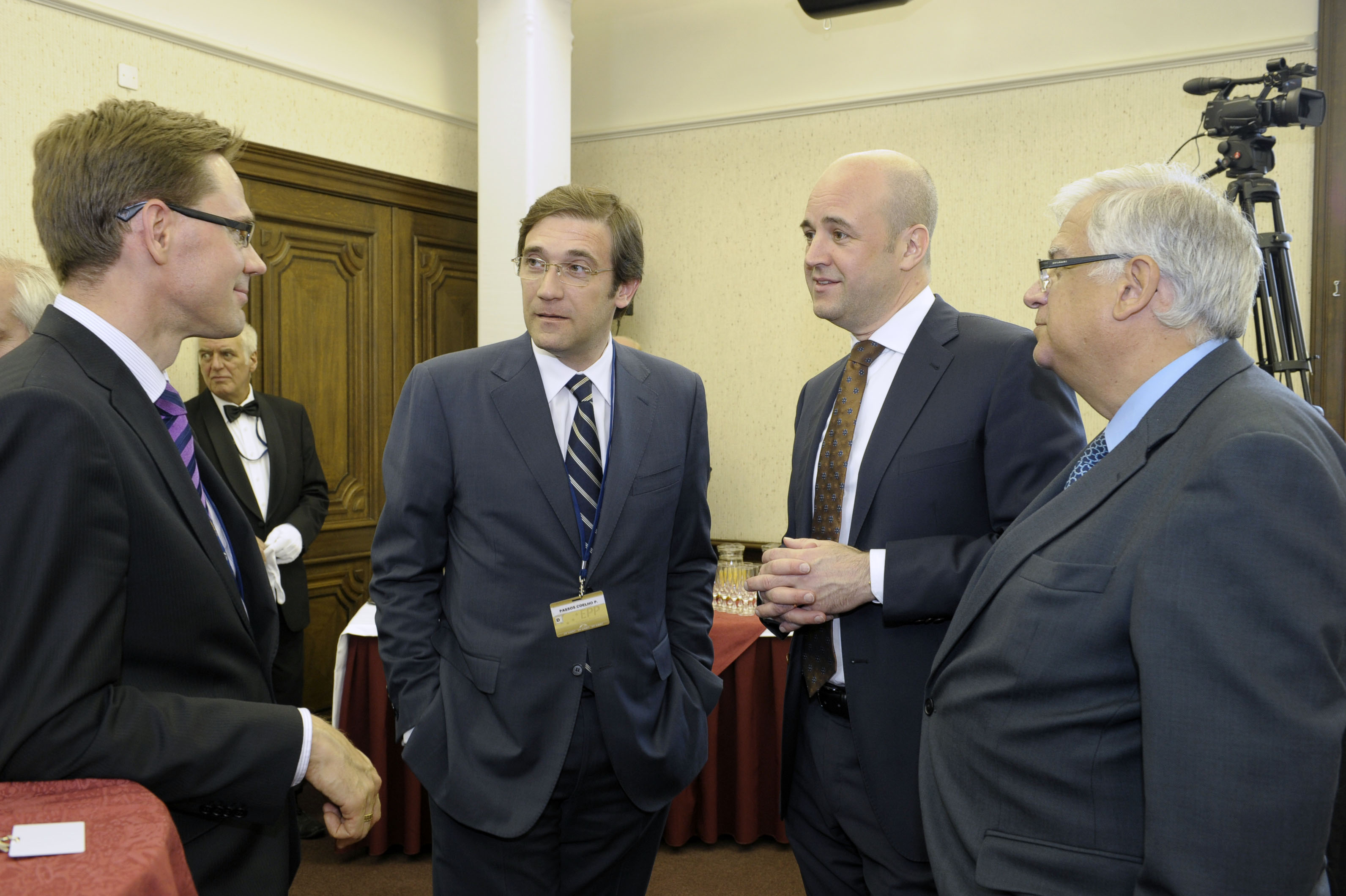 EPP Summit June 2010 (29)